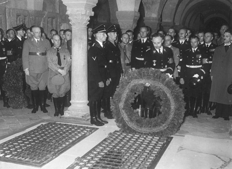 Am 1. Juli 1938 fand wie auch in den Vorjahren eine nächtliche Feierstunde anlässlich des Todestages König Heinrichs I. zu Quedlinburg statt. UBz: Der Reichsführer SS Himmler legt auf die Grabstätte des Königs den Kranz; hinter ihm von links: SS Gruppenführer Wolf, Gauleiter und Reichsstatthalter Jordan, SS Gruppenführer Heydrich und SS Obergruppenführer Heissmeyer Foto Ho